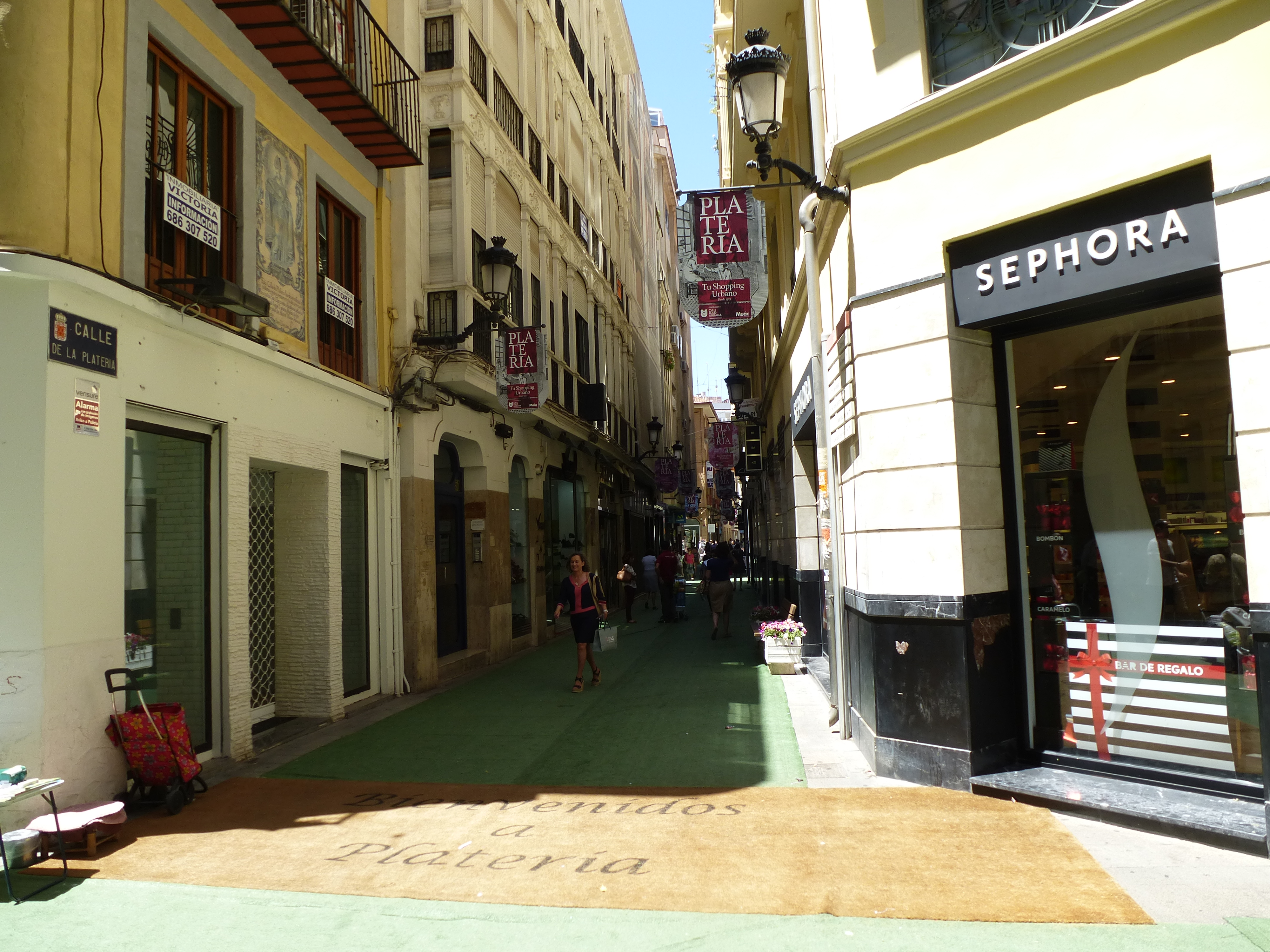 rue de la plateria